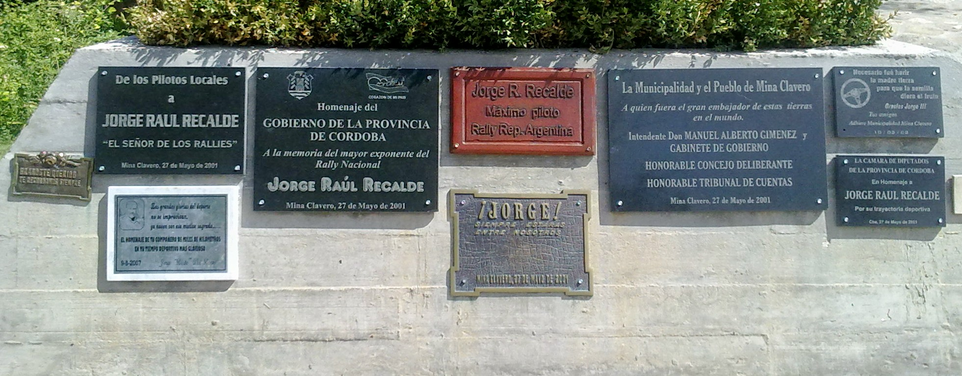 Placas en homenaje a Jorge Recalde frente a la casa donde vivió, en Mina Clavero, Provincia de Córdoba, Argentina.